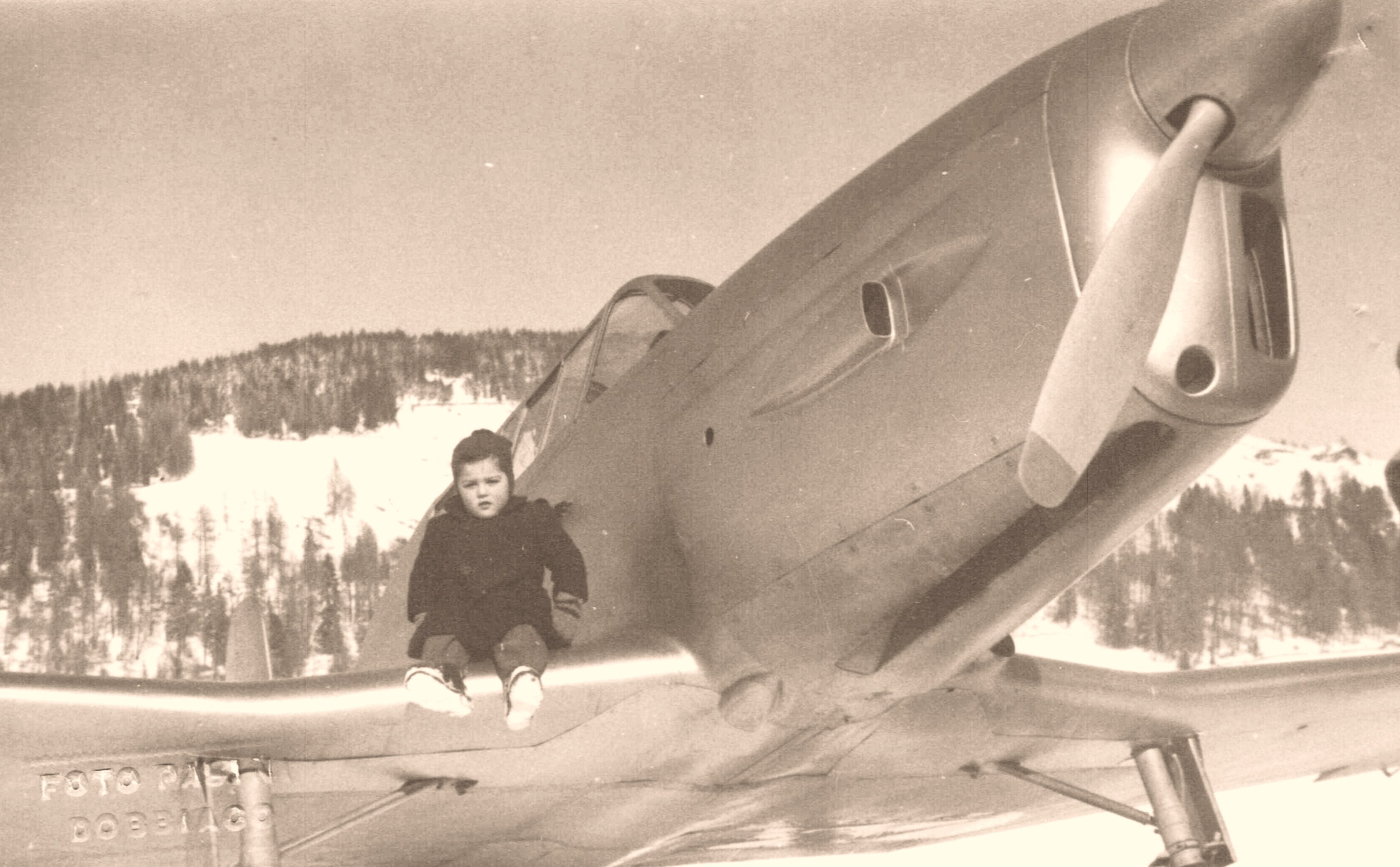 Roberto, un giovane dobbiacense, sopra ad un Fiat G-46 a Dobbiaco (1946)